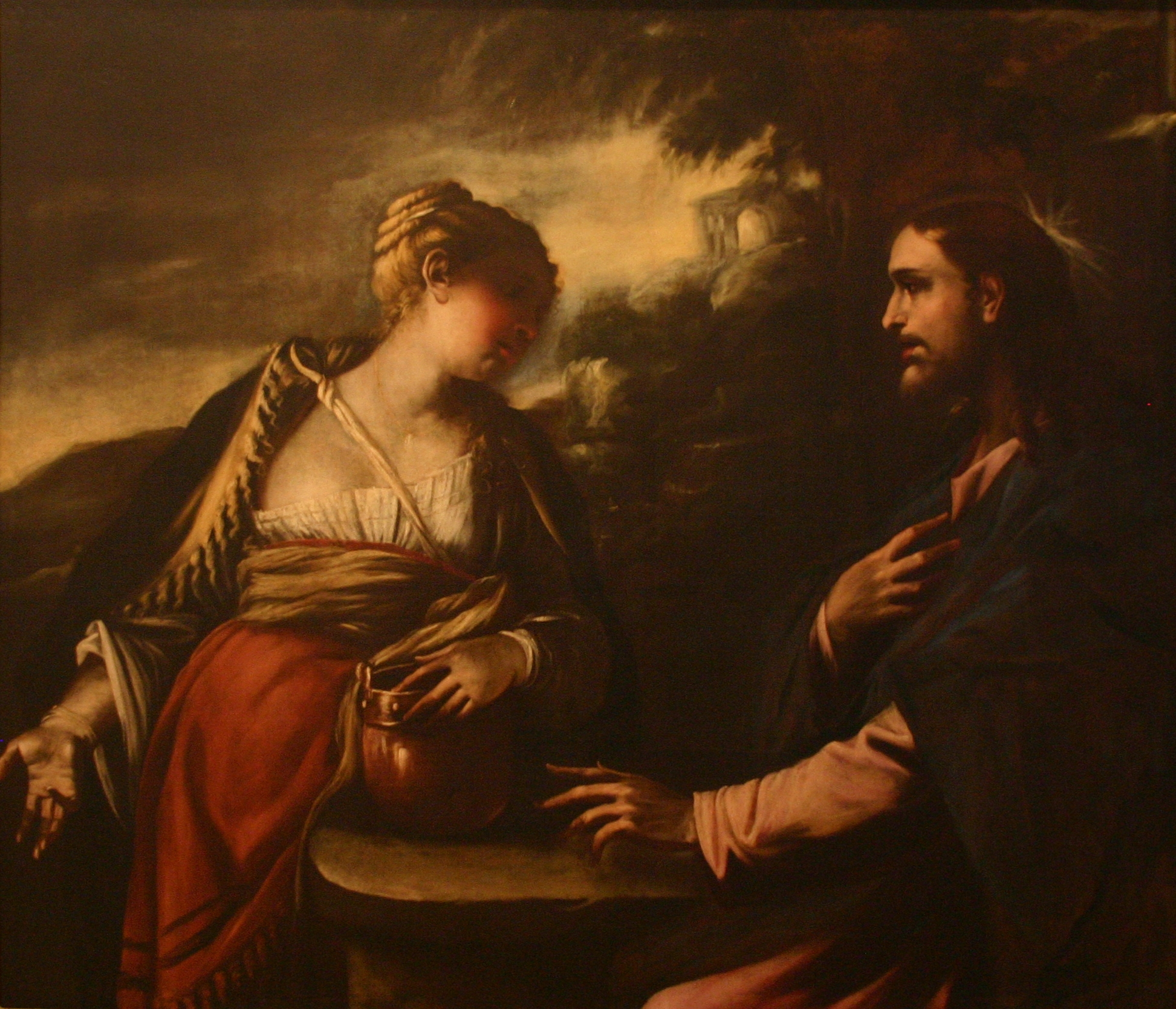 Castel Nuovo - Nápoles